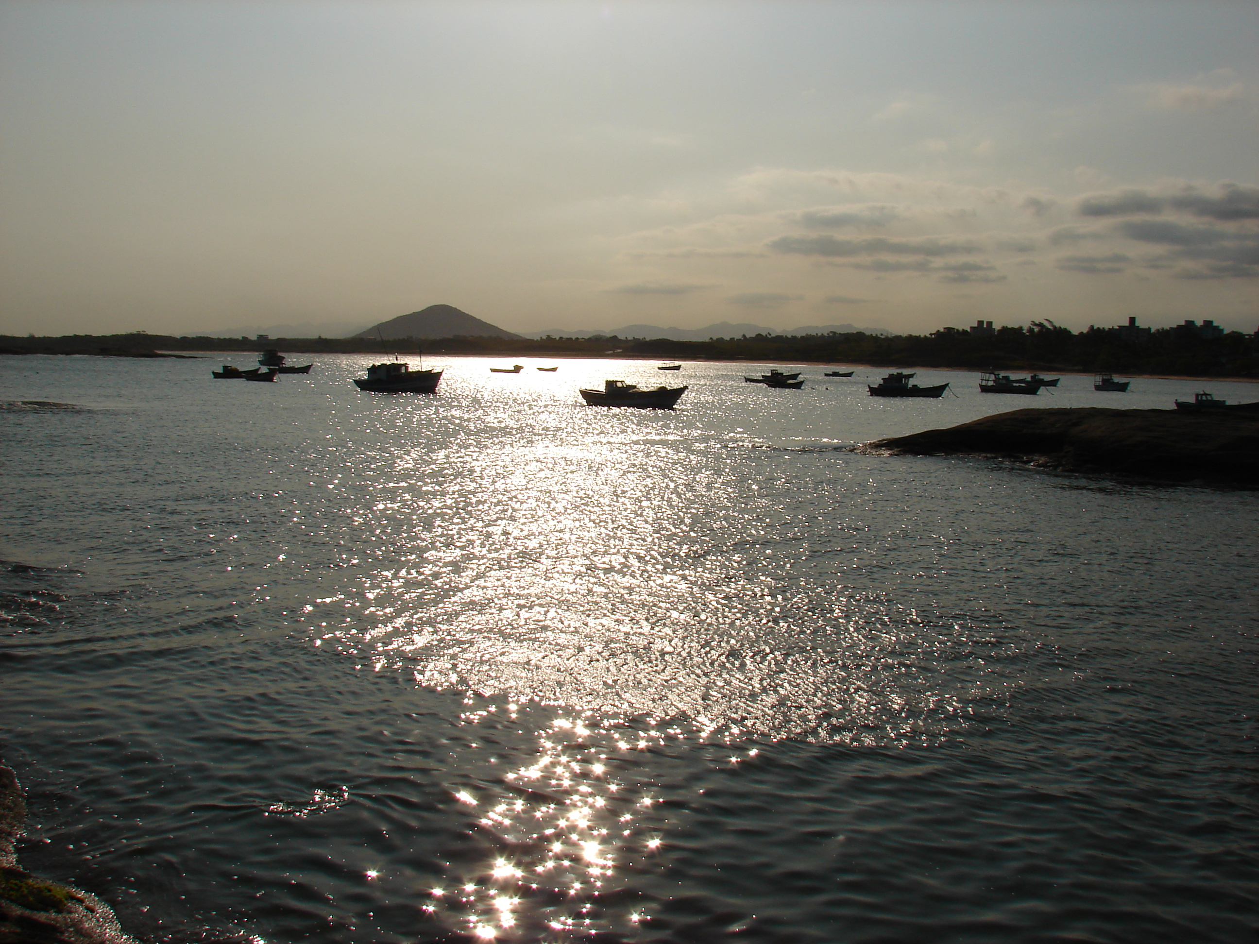 Foto do litoral de Meaípe-ES (Brazil)